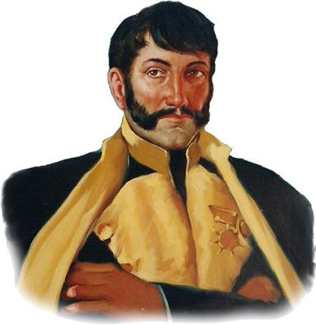 Retrato del General Ambrosio Plaza